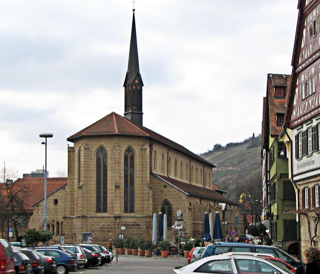 selbst fotografiert GNU-FDL